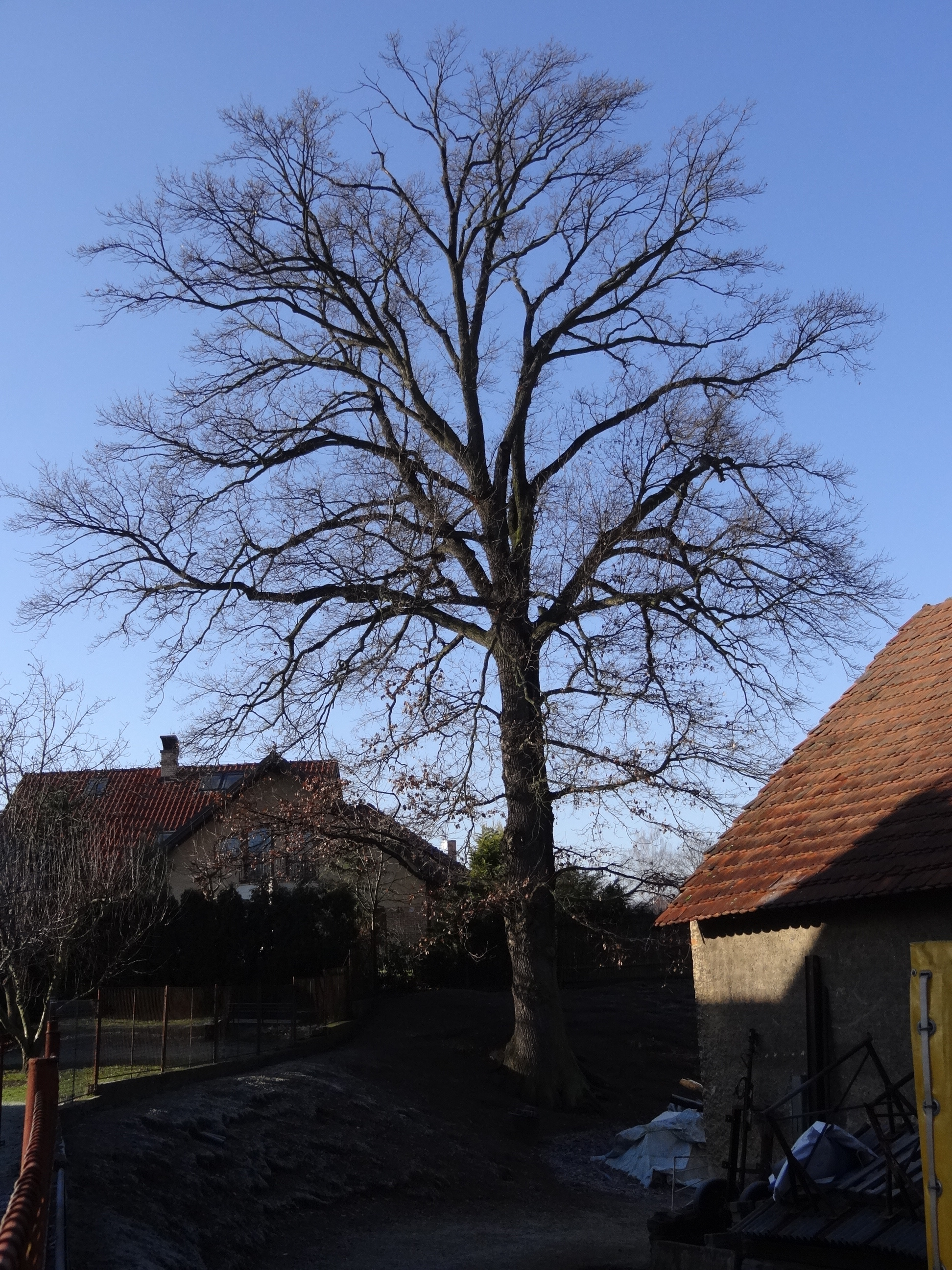 Kolovraty - památný dub letní v ulici Do Lipan v zahradě za čp. 18